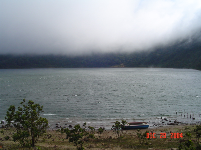 Vista de la Laguna de Ipala